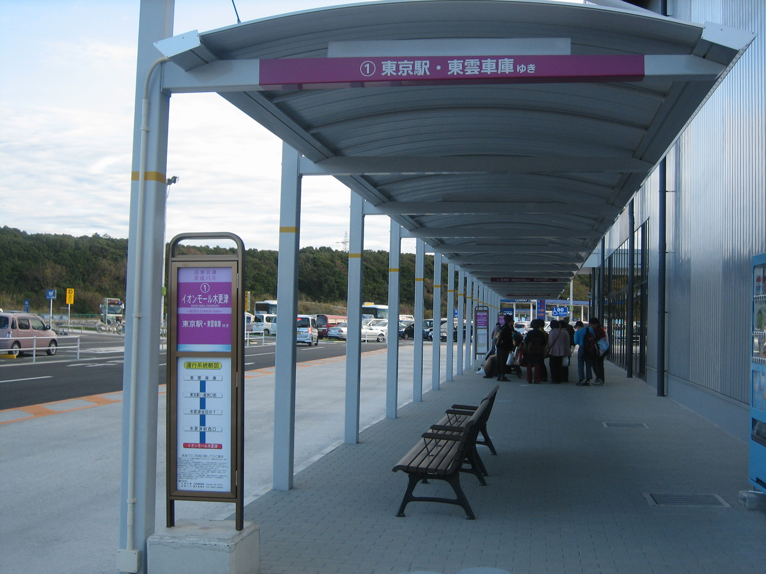 イオンモール木更津内にあるバス乗り場。東京行の高速バスが発車する。